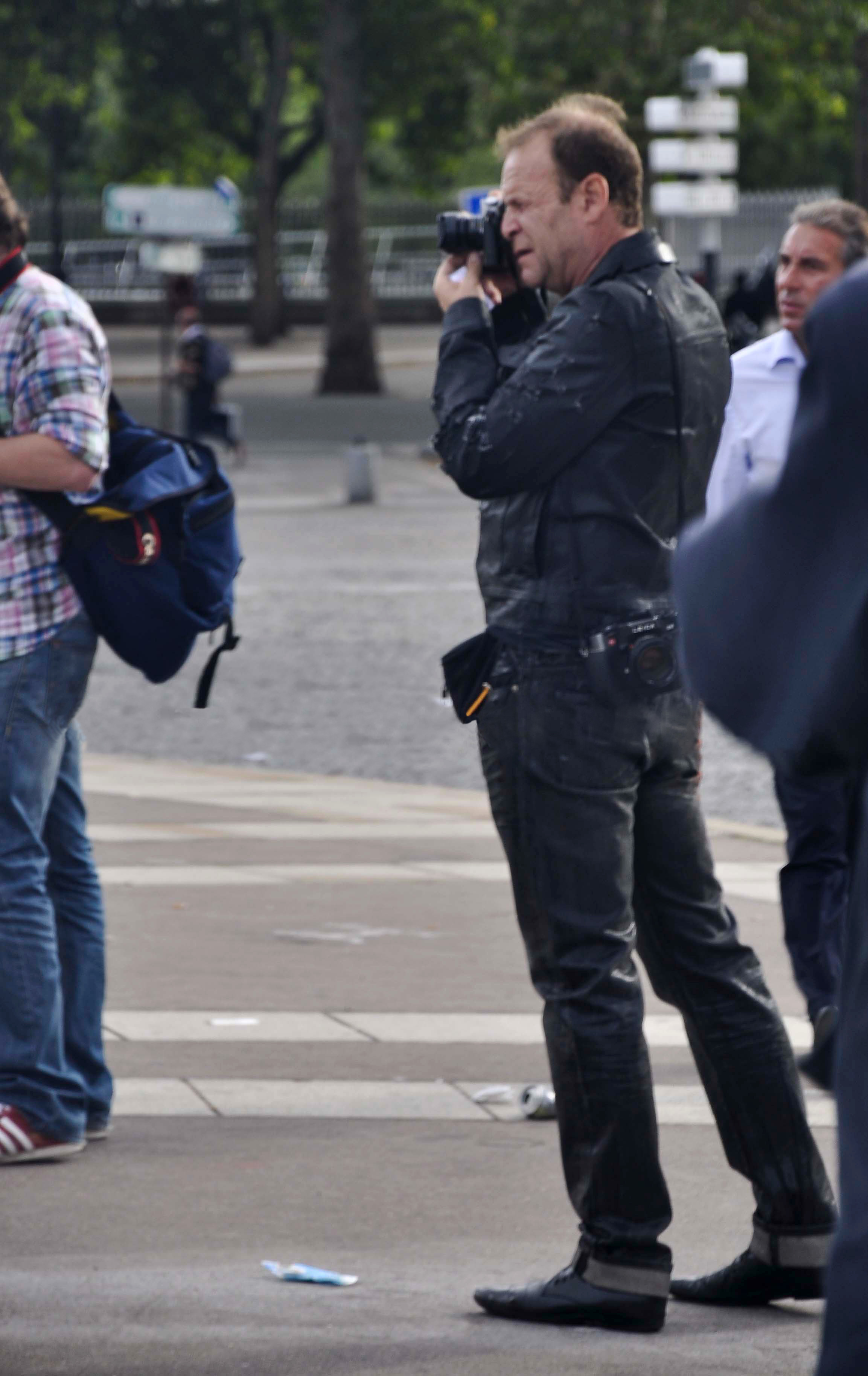 François Marie Banier à la manifestation pour une autre réforme des retraites.